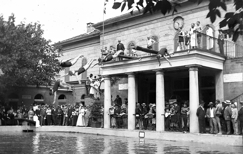 Bagno Diana. Trampolino dei tuffi, ca. 1900, foto Leone Soldati, gelatina ai sali d’argento su lastra stereoscopica, 4,5×10,7 cm. Archivio Soldati, Milano.